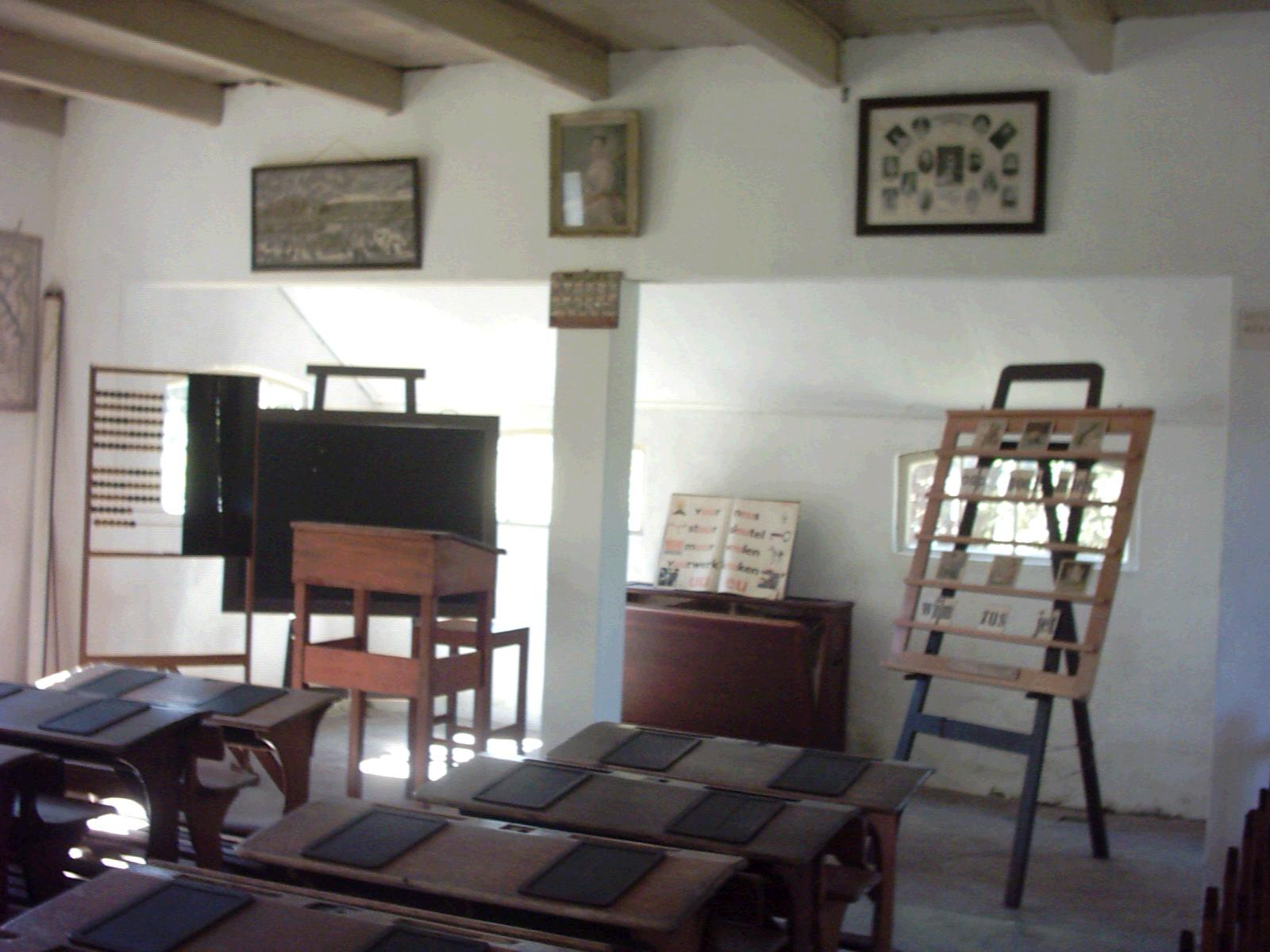 Description Ellert en Brammertmuseum Dateonbekend-2002SourceOwn workAuthorJan Clevering Ellert en Brammertmuseum